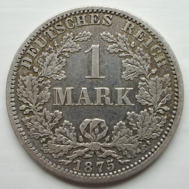 1 Mark geprägt 1875 Selbst fotografiert am 9.3.2006